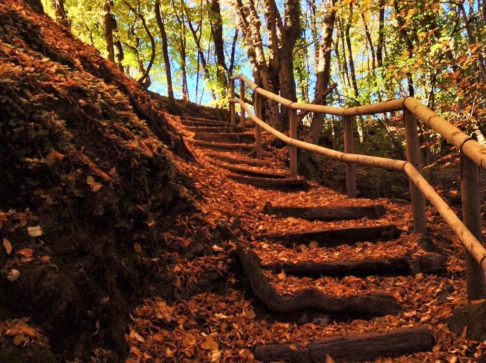 Gocciadoro (Q49967539)